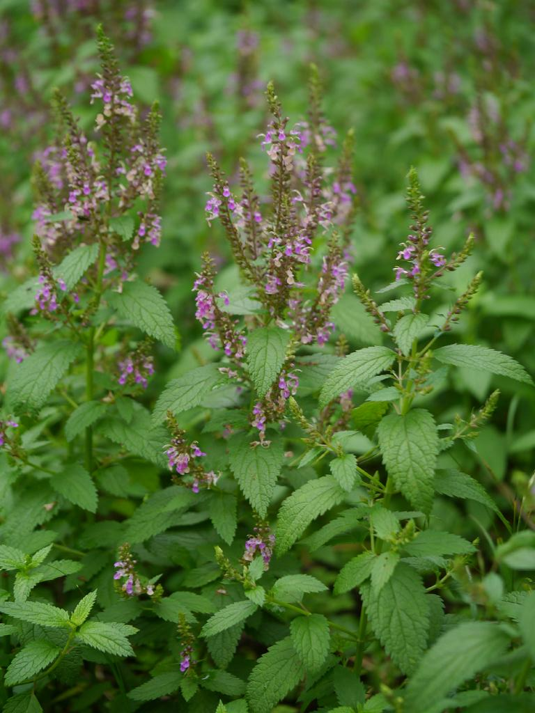 Teucrium japonicum：ニガクサ 2016.07.10 和歌山県田辺市：Tanabe City. Wakayama Pref. Japan